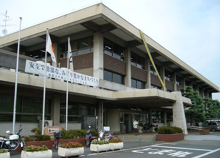 Neyagawa City Hall in Osaka-fu, Japan